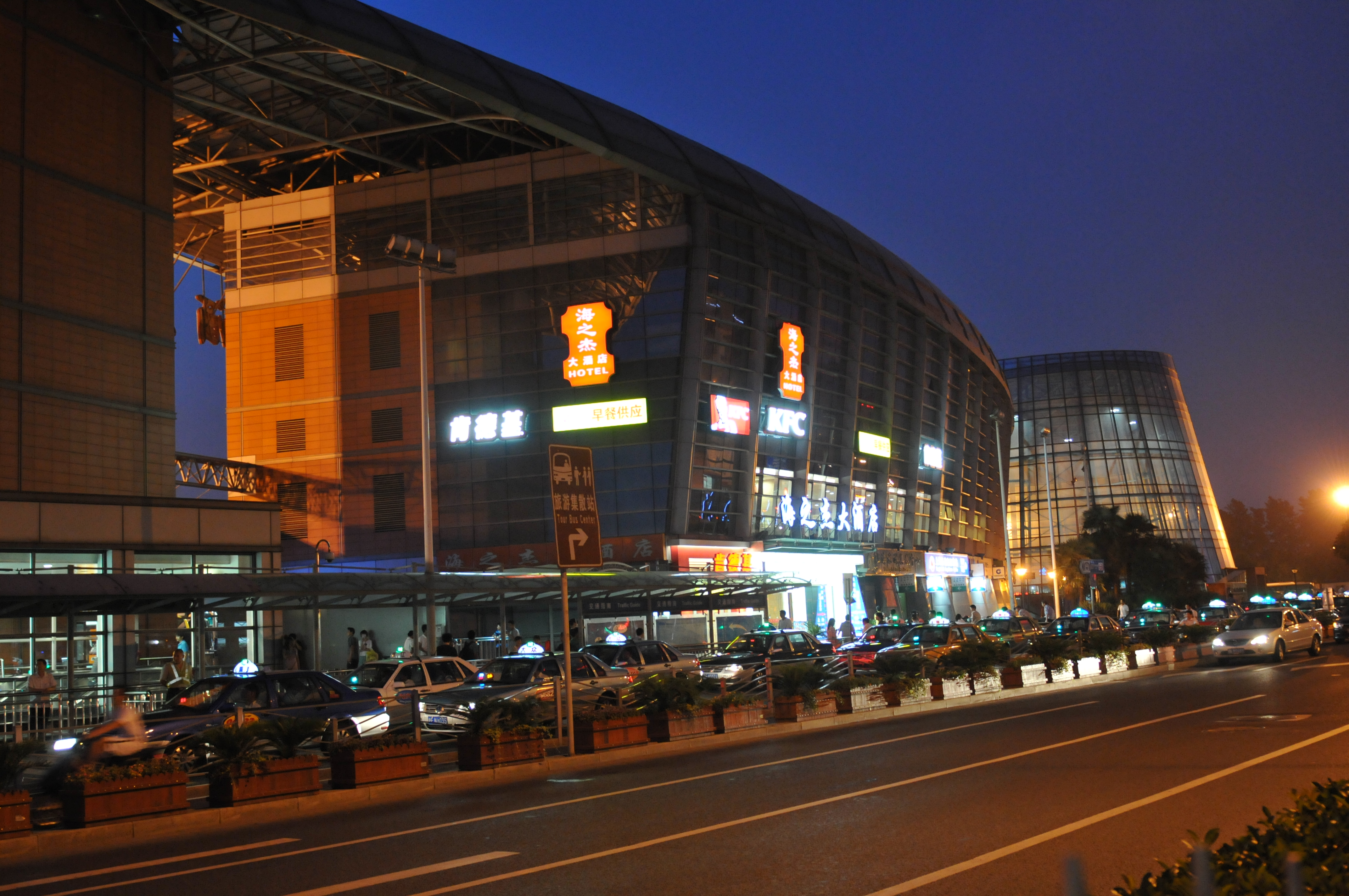 中国上海市徐汇区China Shanghai, Xuhui District, China Xinjiang Urumqi Welcome you to tour the, Китай Синьцзяна Урумчи приветствовать Вас на экскурсию, الصين ترحب زيارتك لاورومتشى فى شينجيانغ, 中国新疆のウルムチへの訪問を歓迎する, 中国新疆乌鲁木齐欢迎您来观光旅游